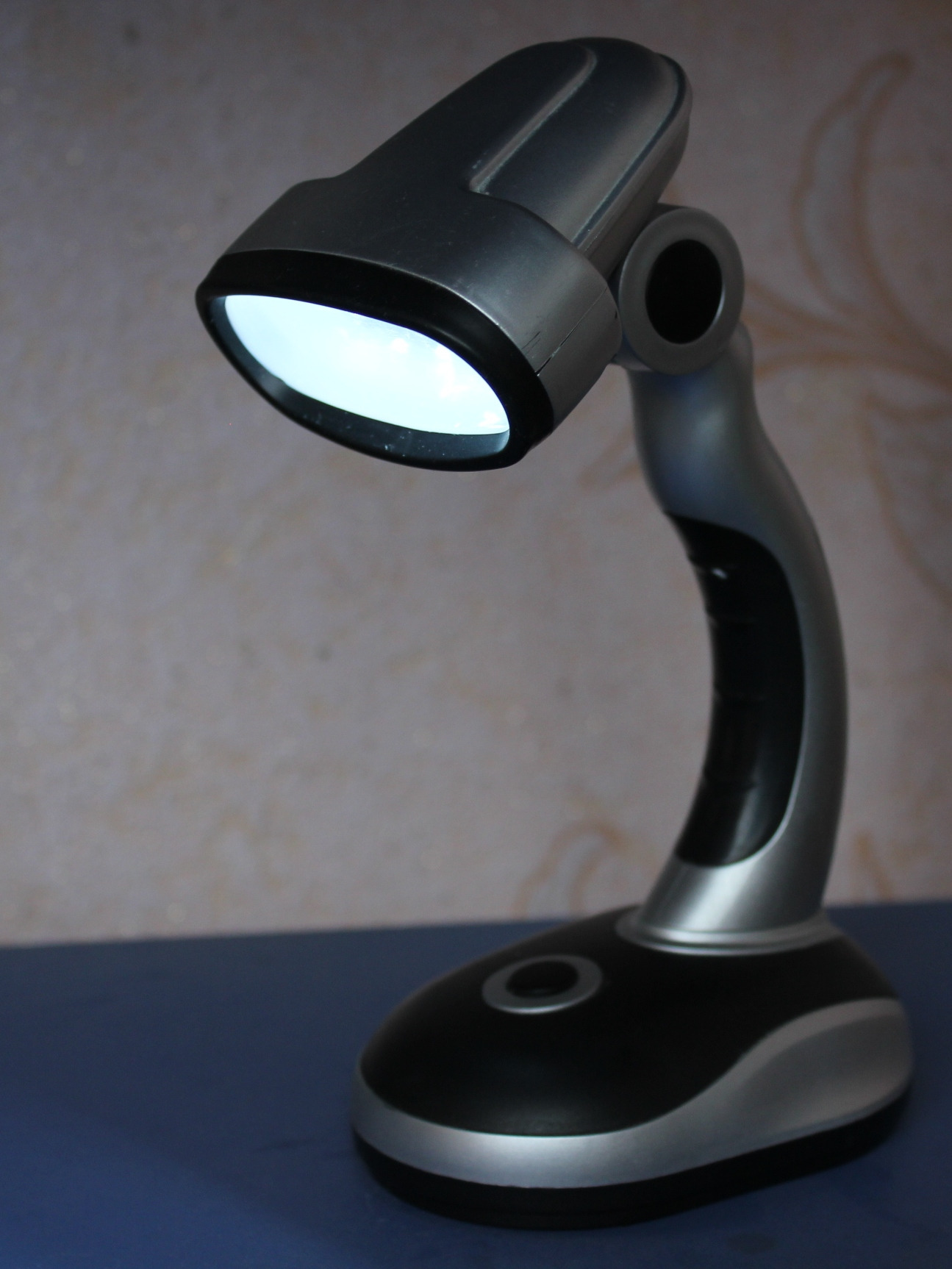 Светильник светодиодный на аккумуляторах АА